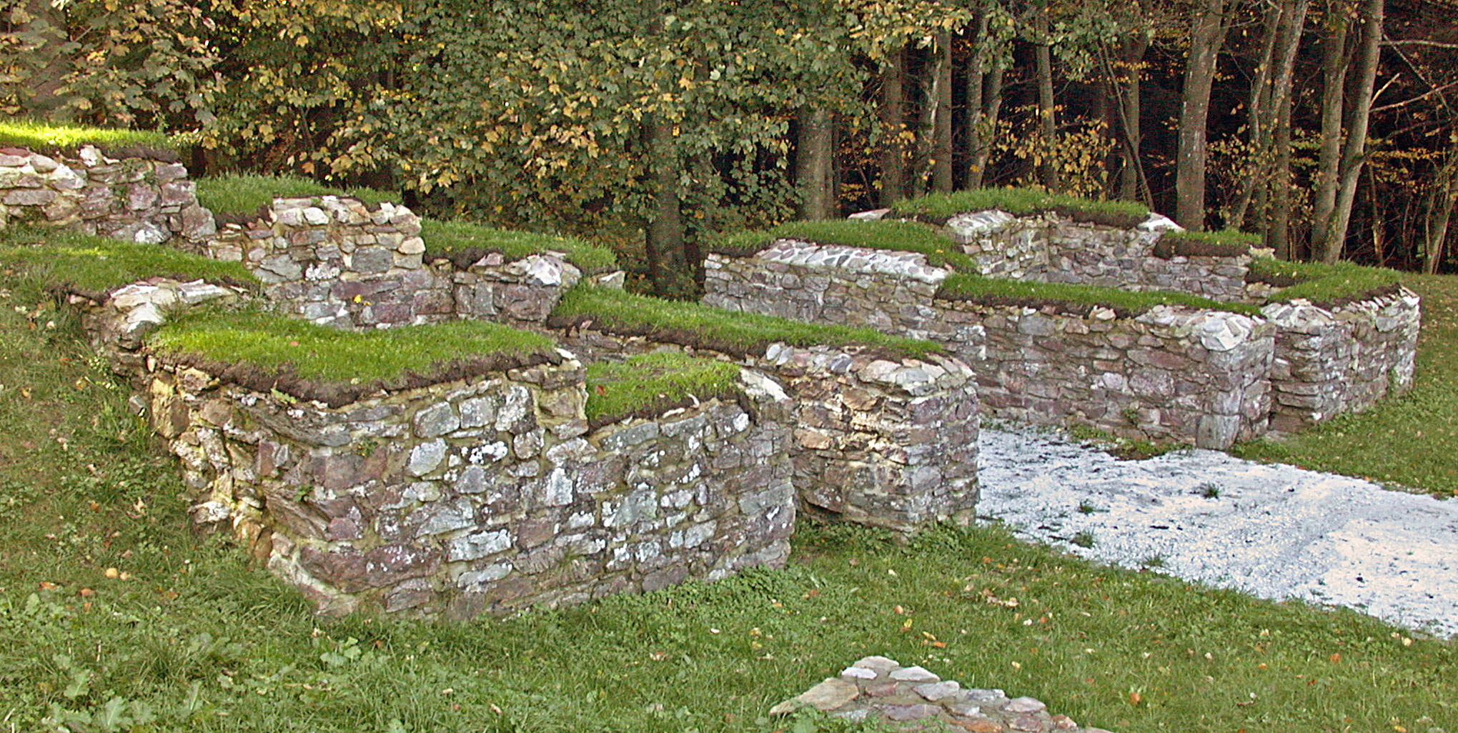 Westtor des Feldbergkastells von innen gesehen, Deutschland